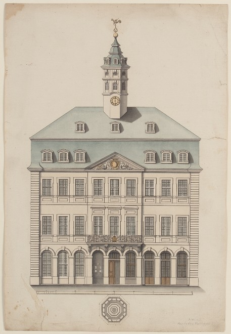 Hanau, Entwurf zum Neustädter Rathaus, Aufriß und Schnitt